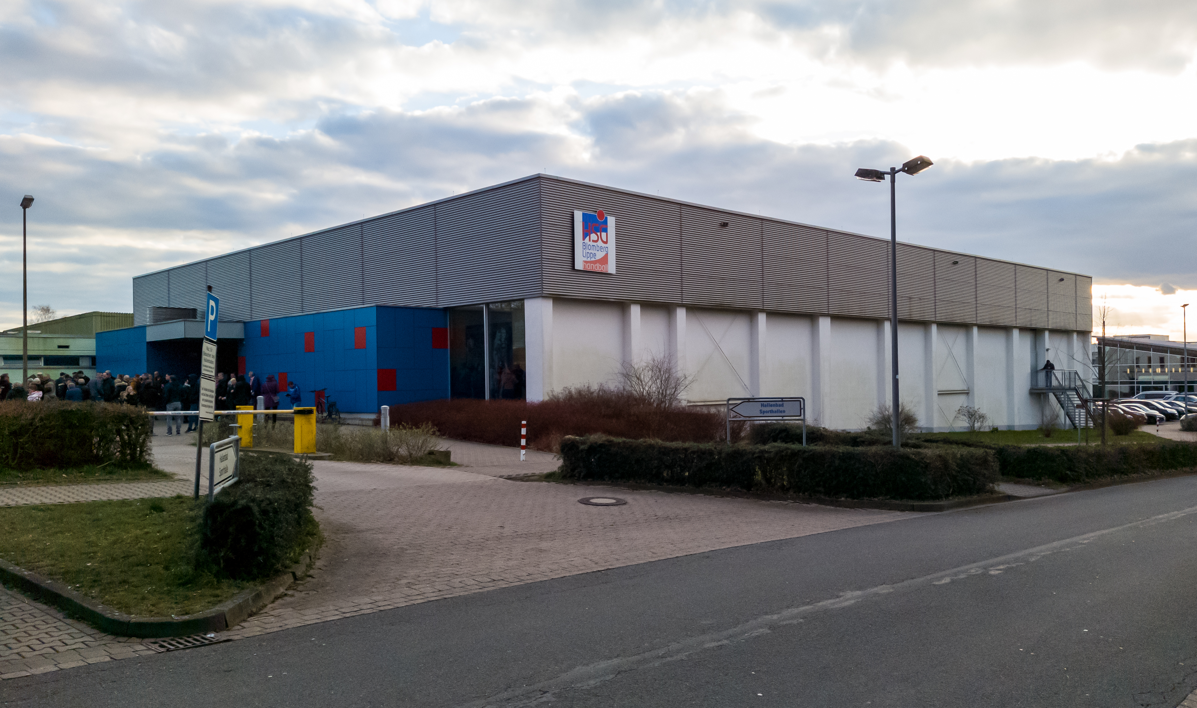 Sporthalle an der Ulmenallee in Blomberg, Spielstätte der HSG Blomberg-Lippe, beim letzten Spiel der abgebrochenen Saison 2019/20